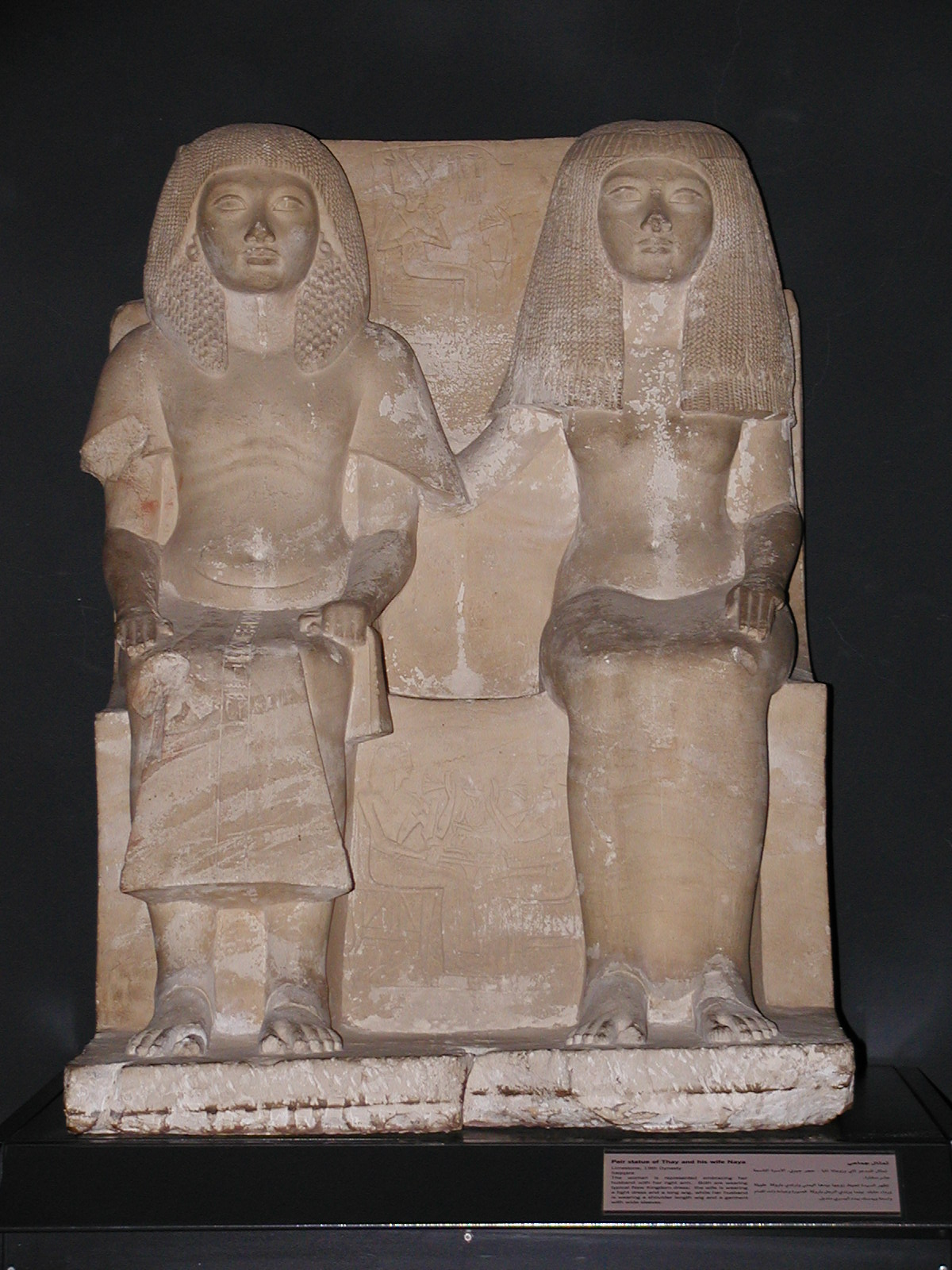 Thay et sa femme Naya (Template:XIXe dynastie égyptienne, trouvé à Saqqarah), Musée national, Alexandrie, Égypte).